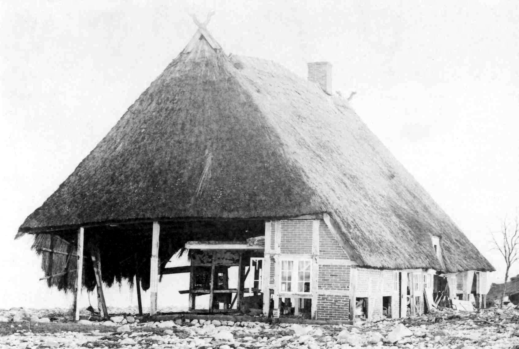 Zerstörtes Gebäude in Niendorf an der Ostsee nach der Sturmflut von 1872